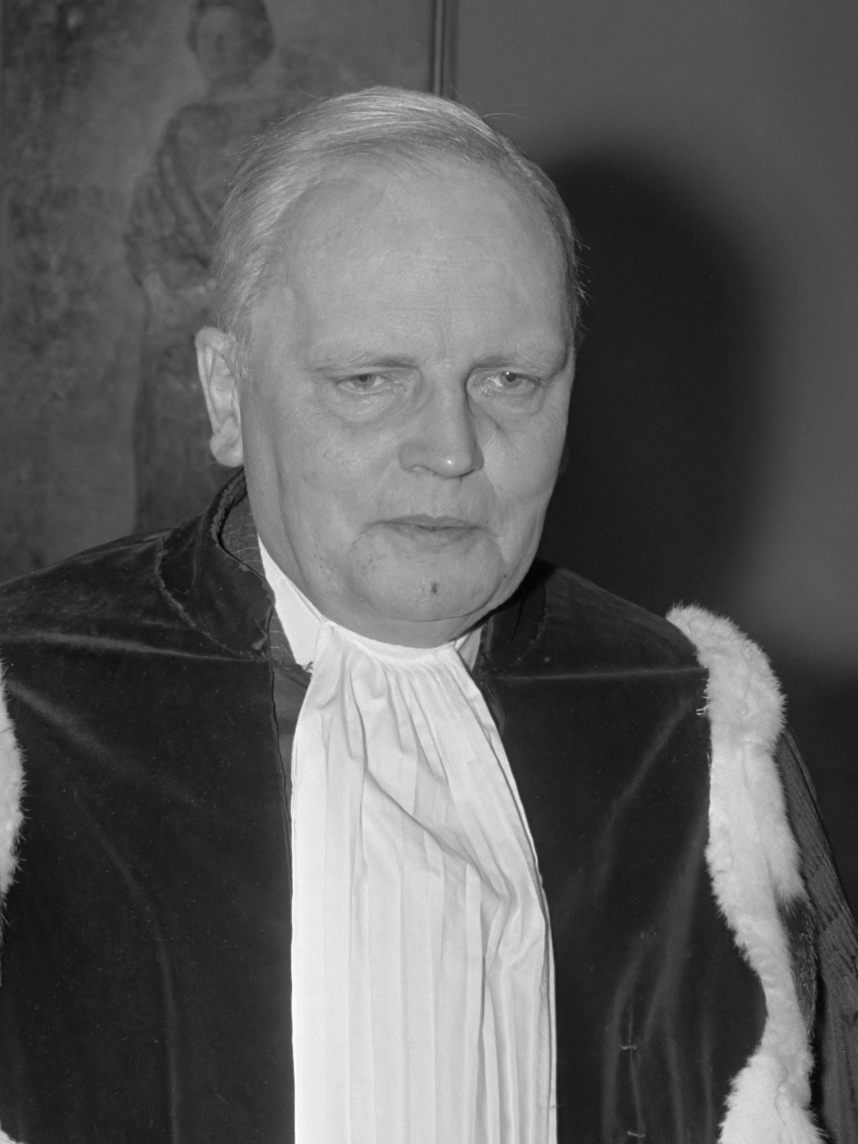 Nieuwe president Hoge Raad Nederlanden geinstalleerd in Den Haag . Mr. F.J. de Jong, nieuwe pres. Hoge Raad, 7a Mr. Langemeyer 16 januari 1970